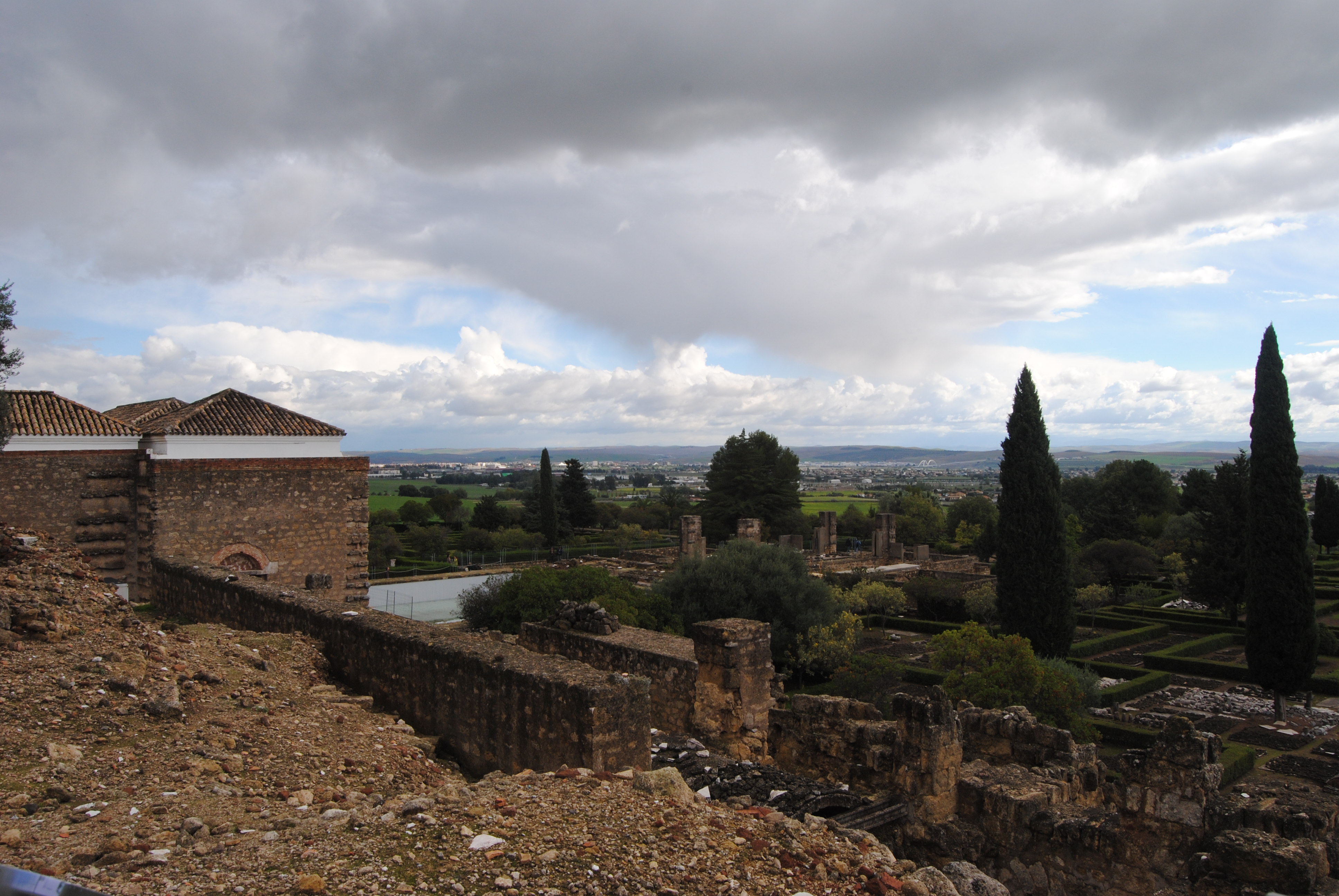 Madinat al-Zahra, Córdoba (España).